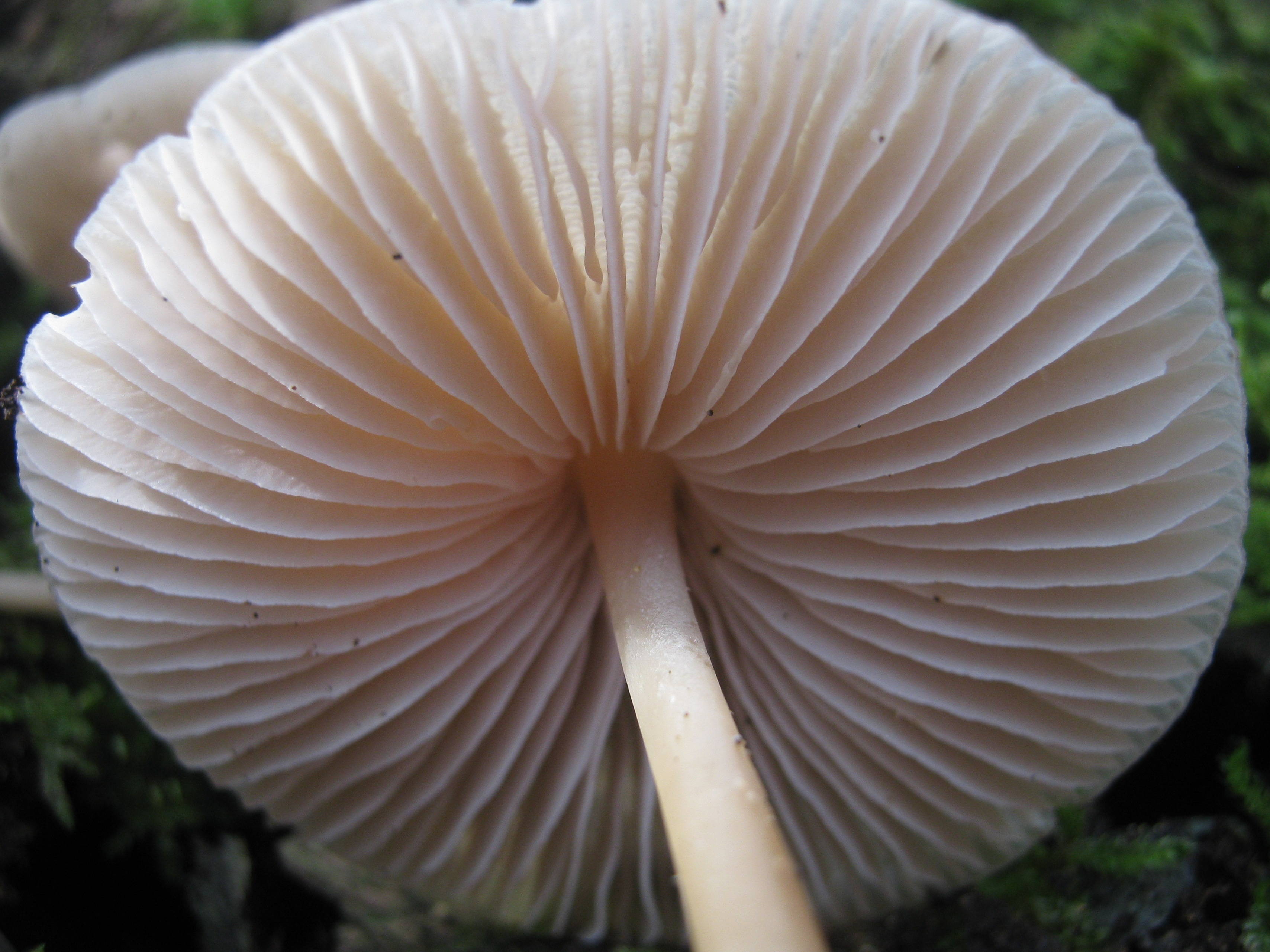 Mycena galericulata (Scop.) Gray